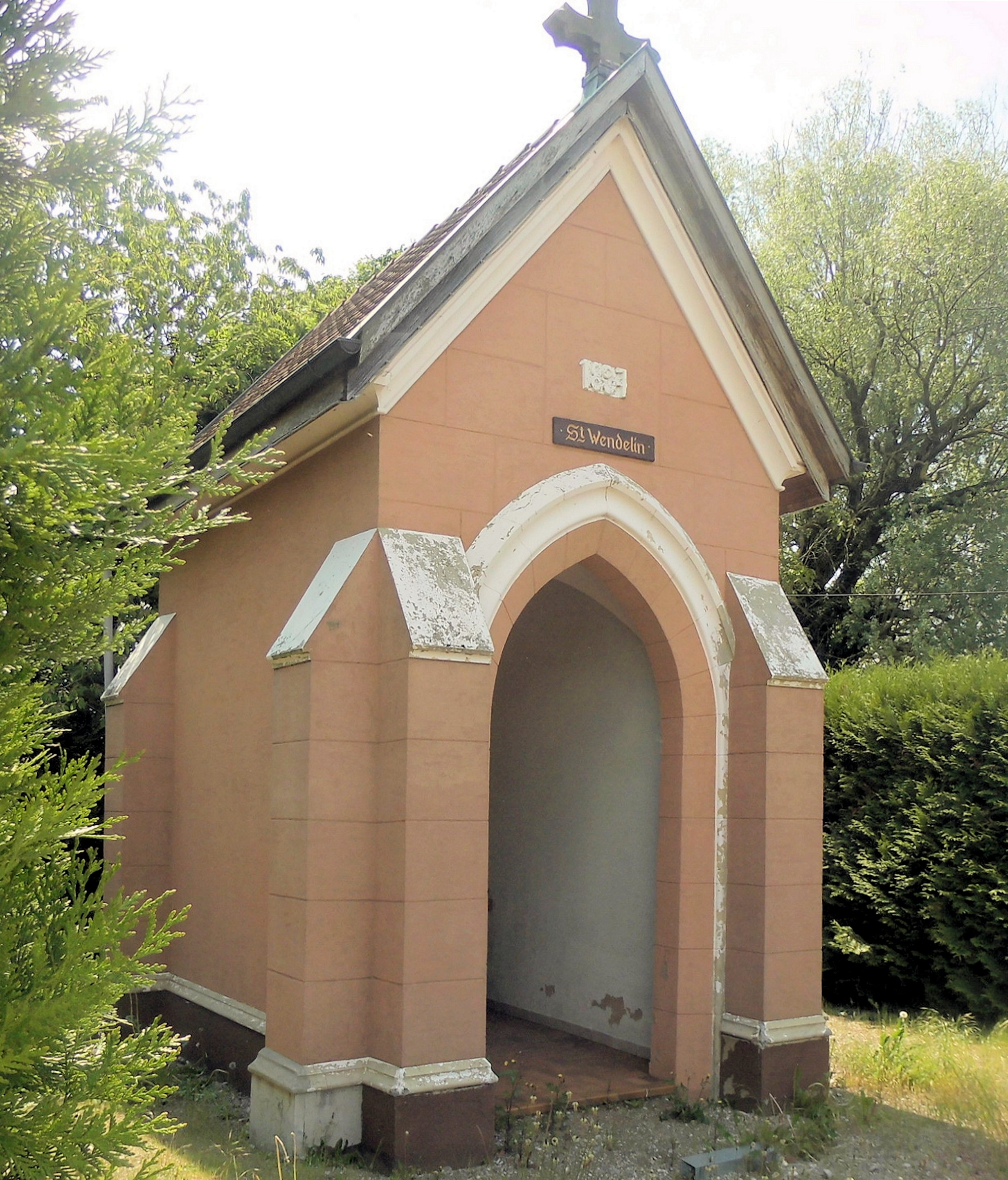 La chapelle Saint-Wendelin à Sierentz